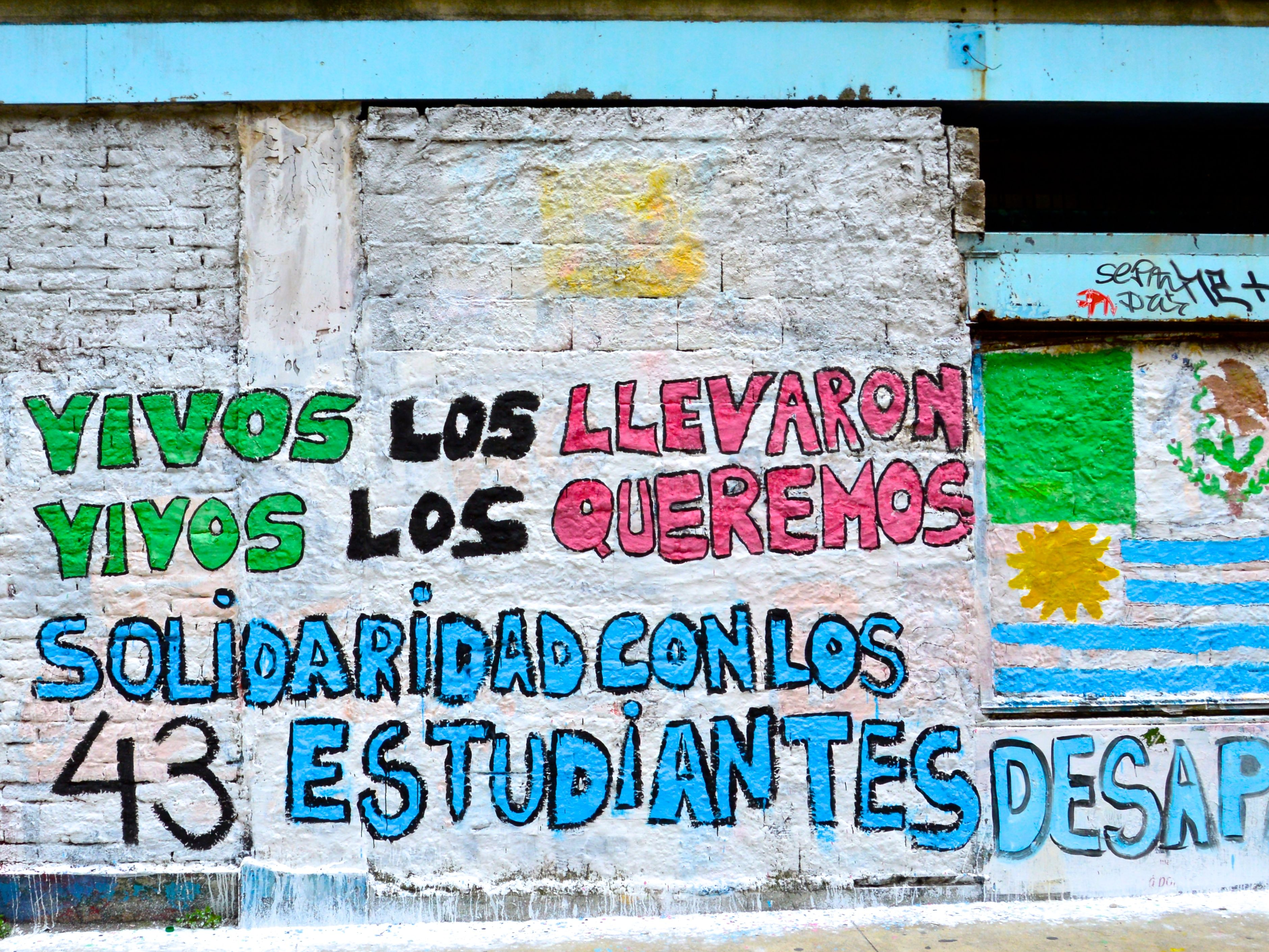 Manifesto pelo desaparecimento de 43 estudantes da Escola Normal Rural Raúl Isidro Burgos em Ayotzinapa (México), que foram sequestrados e mortos na cidade de Iguala, Guerrero (também no México).